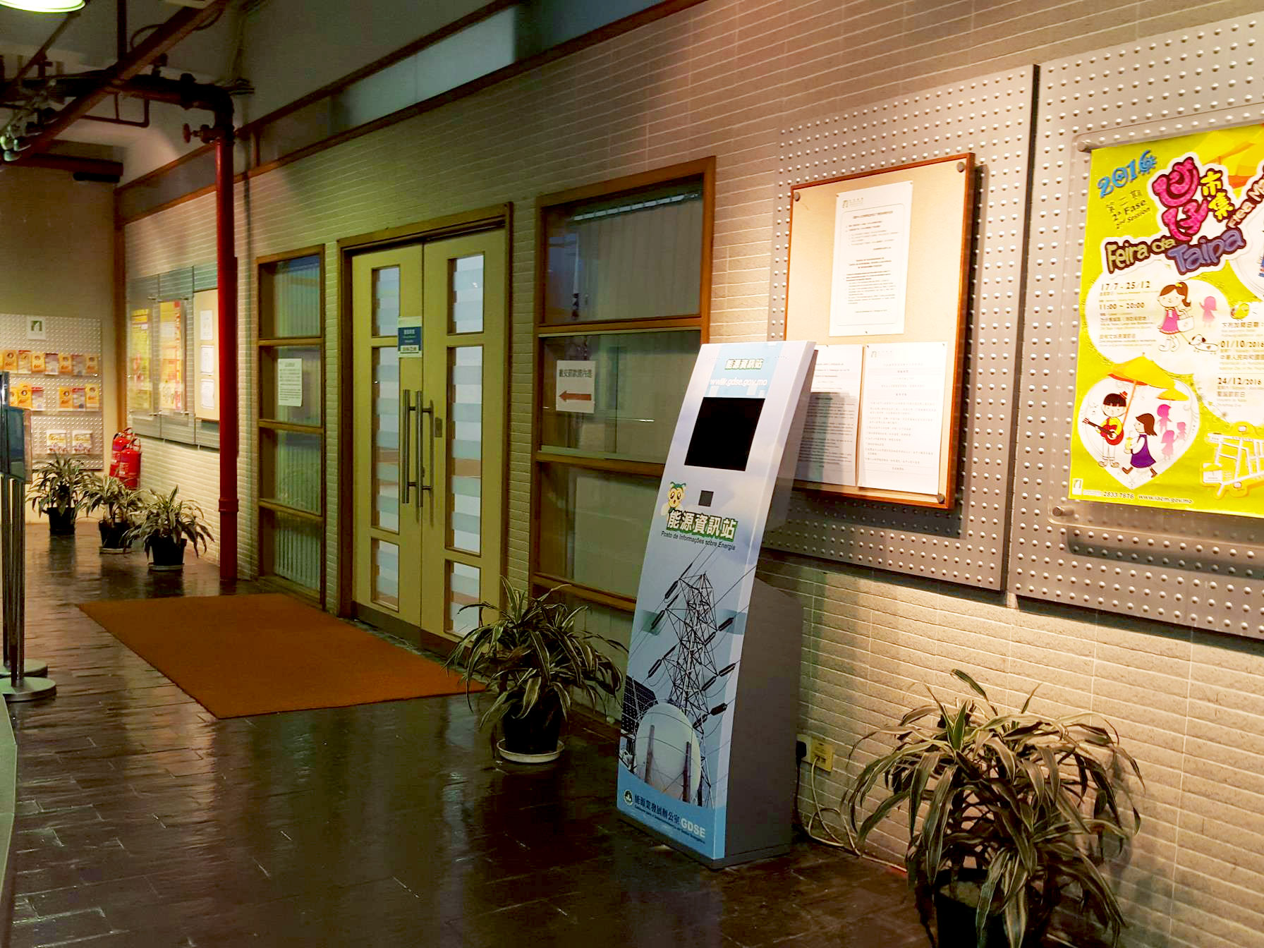 Complexo Municipal do Mercado de S. Domingos